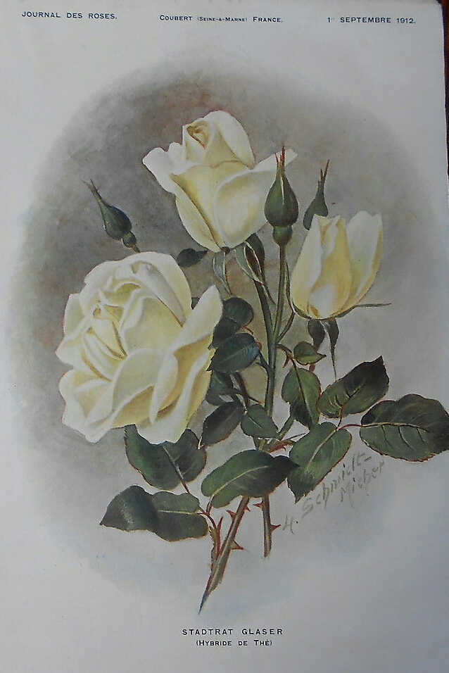 Rose hybride de thé 'Stadtrat Glaser' (Kiese 1910), illustration de Schmidt-Michel dans le numéro de septembre 1912 du Journal des roses.